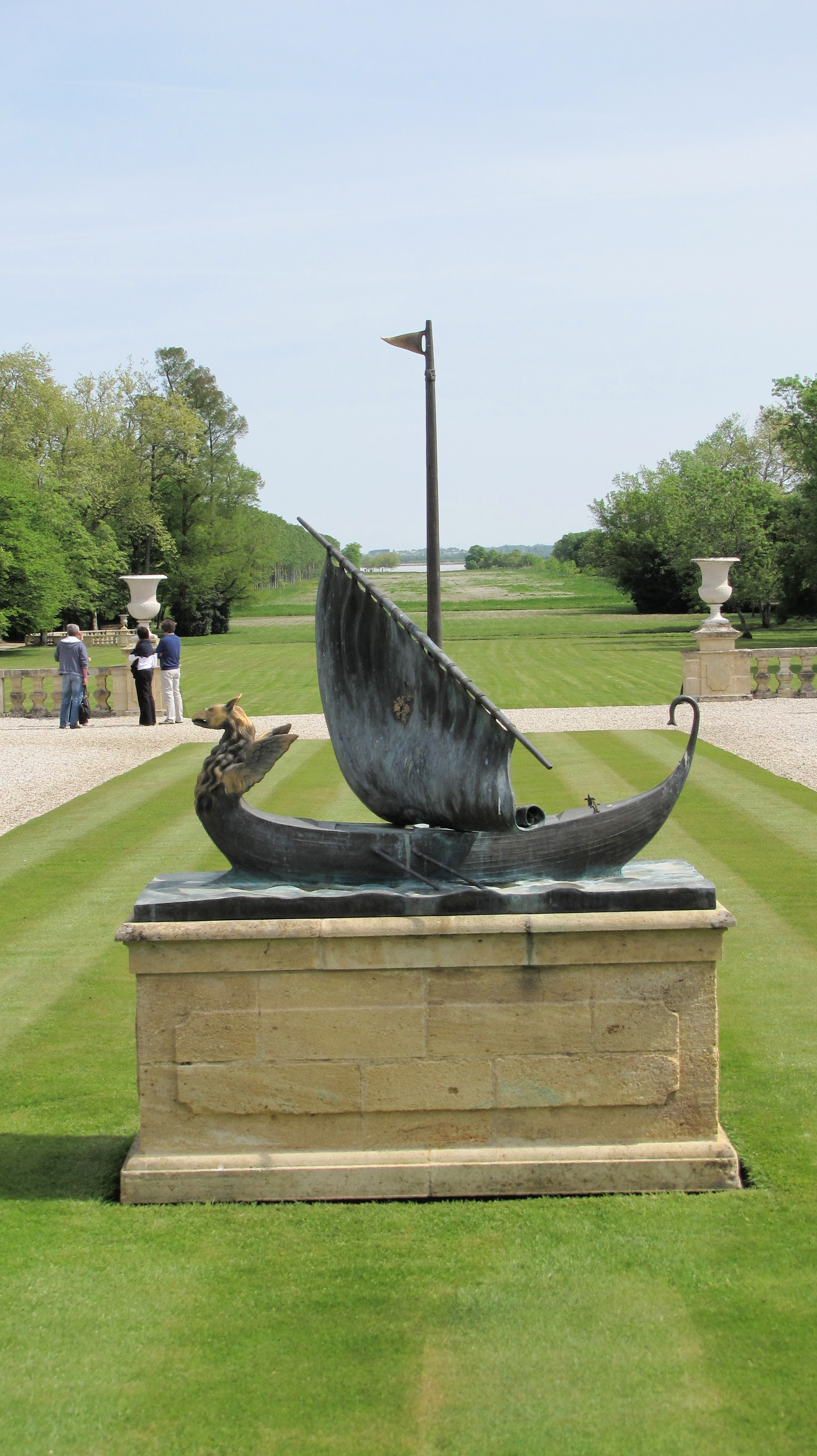 Parc et monument du château Beychevelle à Saint-Julien-Beychevelle, France